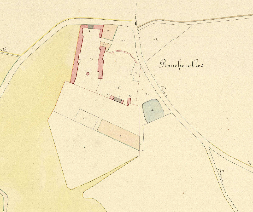 Extrait du cadastre napoléonien réalisé en 1828 montrant le domaine de la ferme-manoir de Roncherolles.